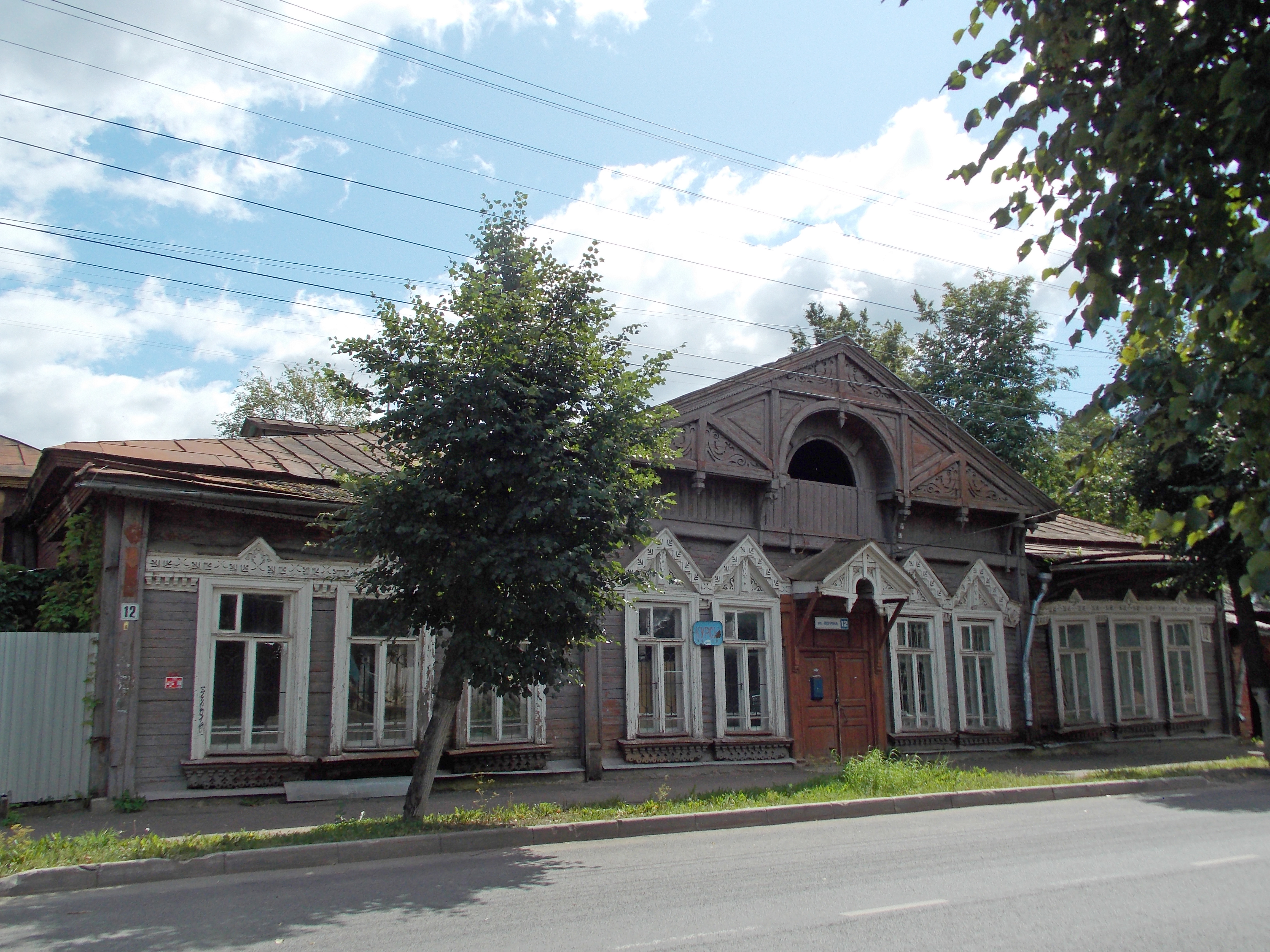 Здание 2-й мужской гимназии: улица Ленина, 12, Кострома, Костромская область